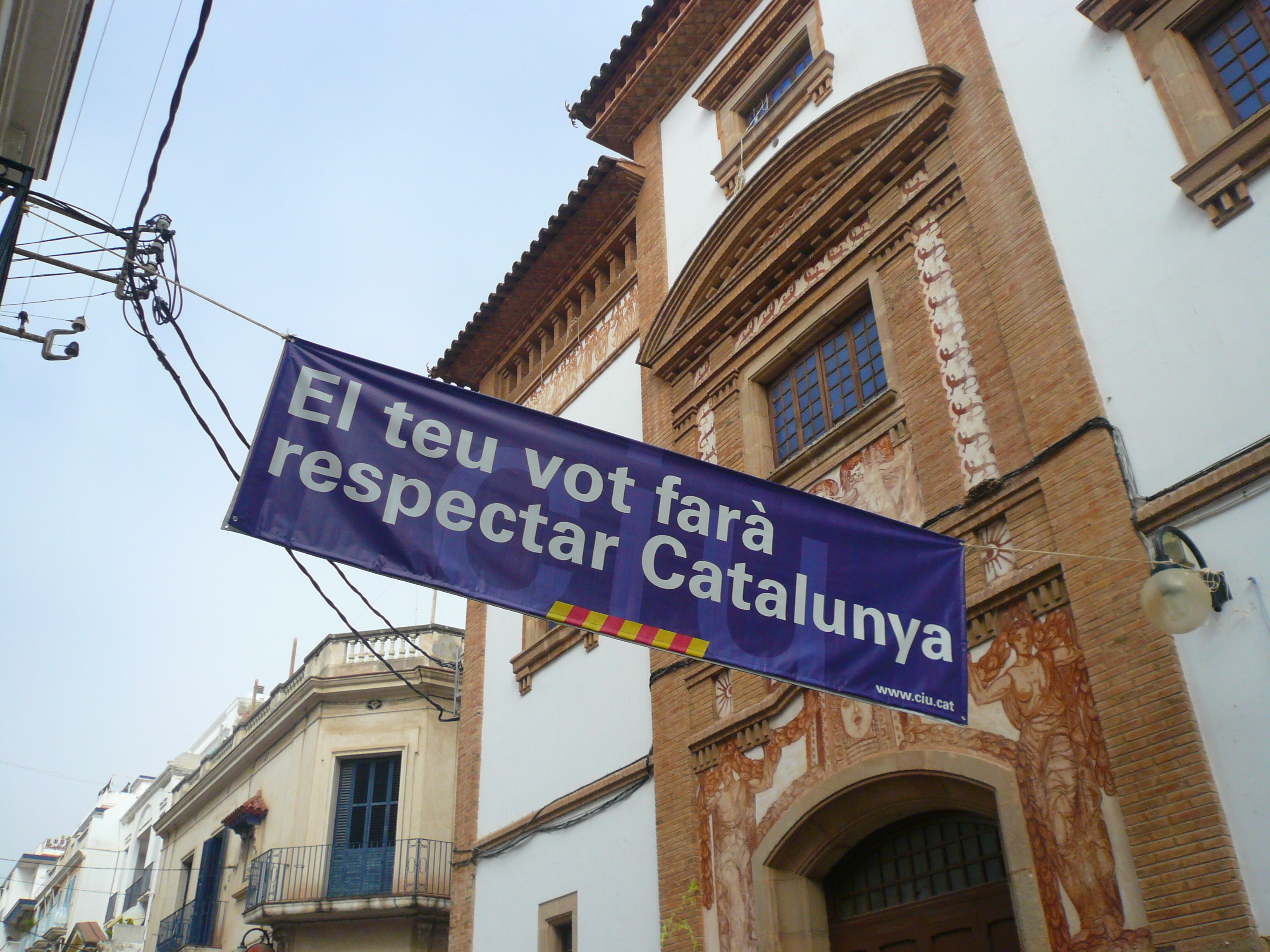 Casino Prado (Sitges) Object location41° 14′ 16.65″ N, 1° 48′ 37.92″ E